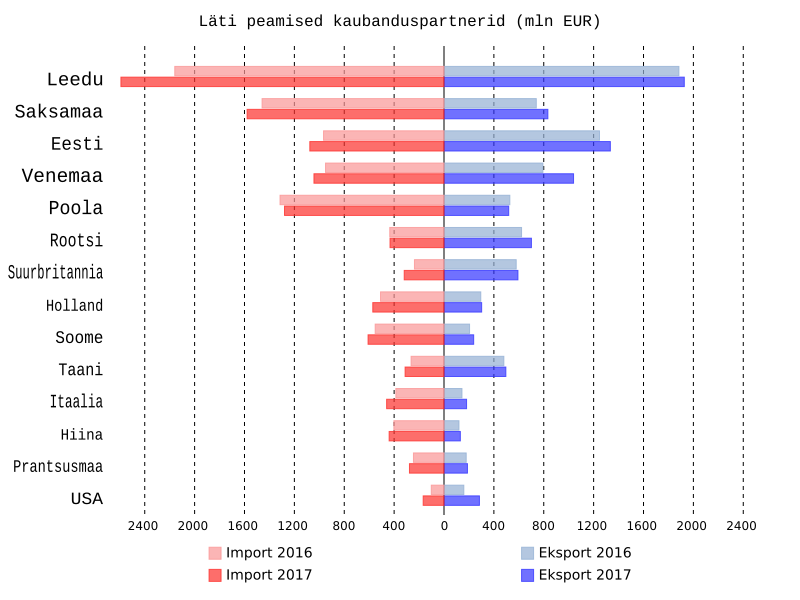 Läti peamised kaubanduspartnerid 2016-2017 andmed: Jānis Hermanis/Statistics Latvia